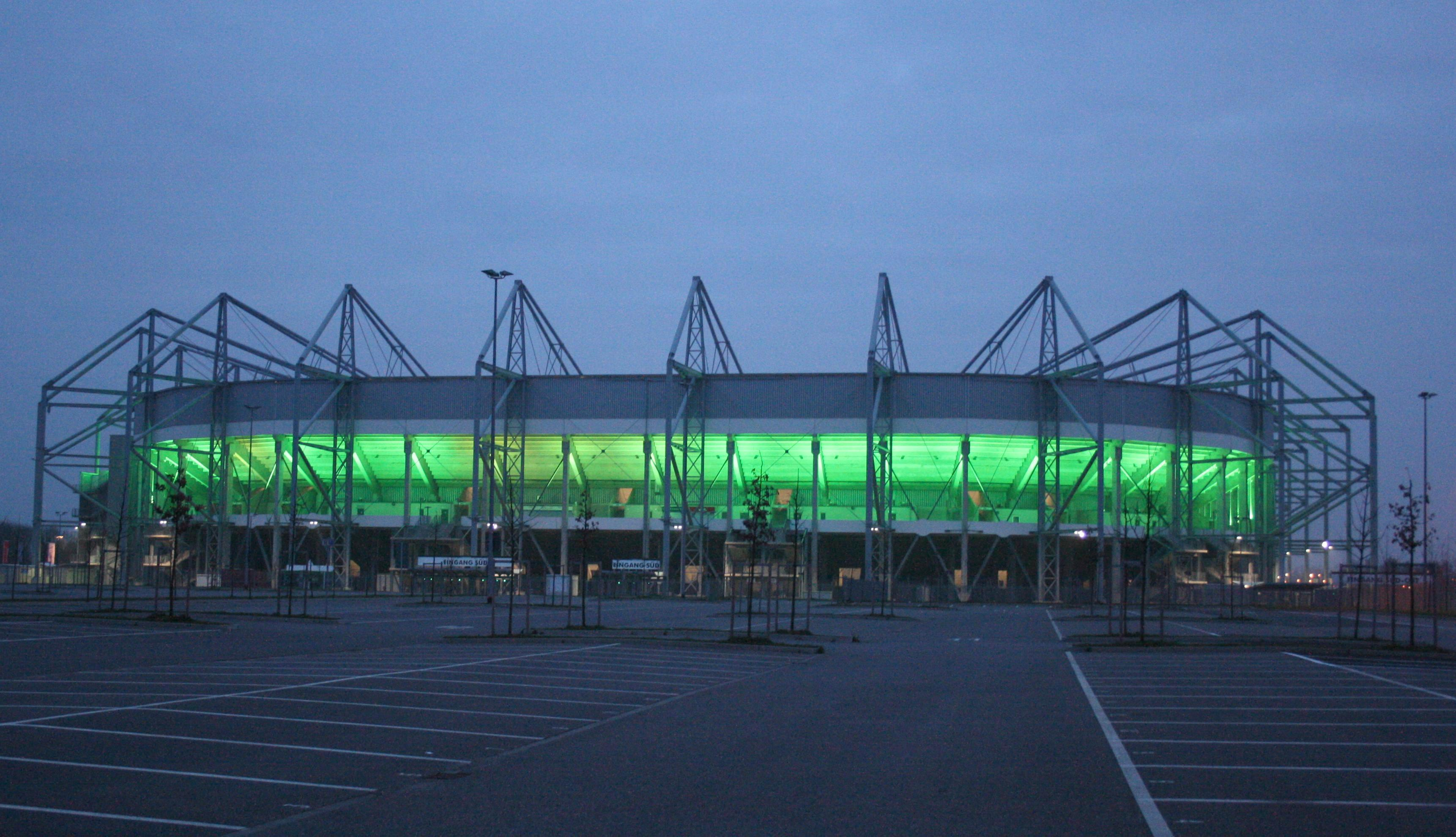 Bild im Mönchengladbach